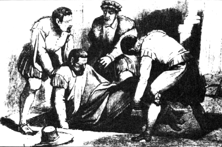 Muerte del factor Illán Suárez de Carbajal a manos del virrey Blasco Núñez Vela